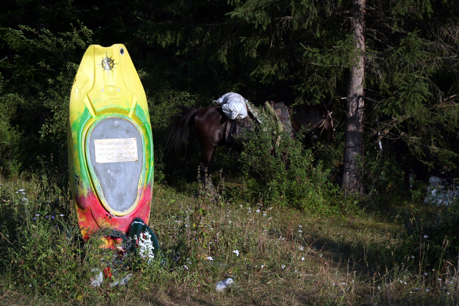 Altay mountains (memorial to Russian waterman), Photo by Vít Hněvkovský, 2006 Altaj (pomník ruskému vodákovi)